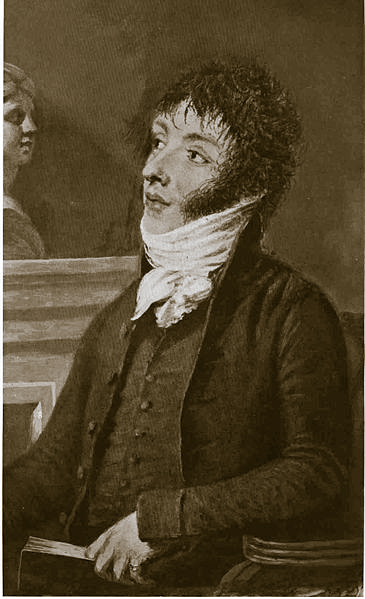 Batyushkov's portrait by Orest Kiprensky (1815).